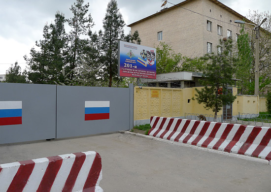 201-я Гатчинская ордена Жукова дважды Краснознаменная военная база